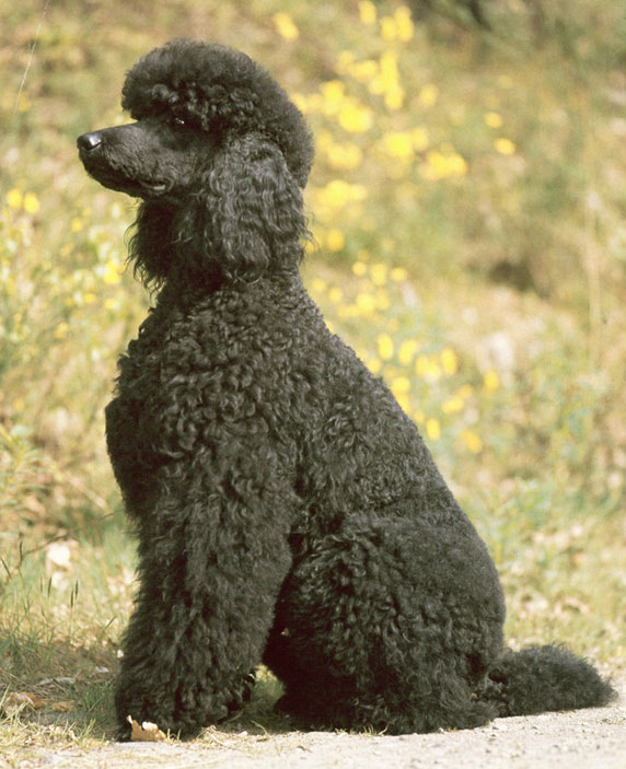 Grosspudel, schwarz - Anthony, der schwarze Joker